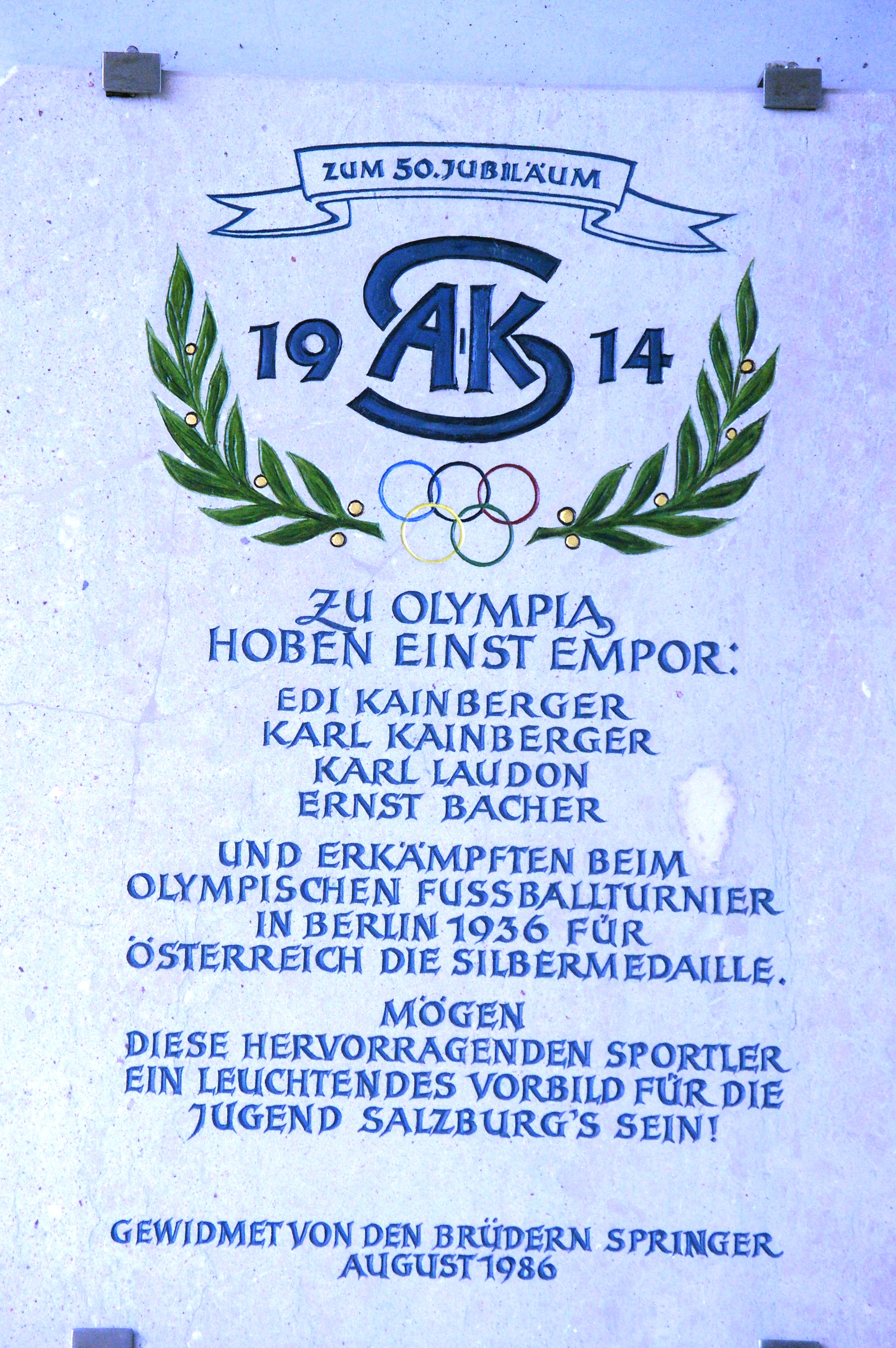 Gedenktafel an die Spieler des Salzburger AK 1914, die 1936 die Silbermedaille bei den Olympischen Spielen in Berlin erreichten (1986)